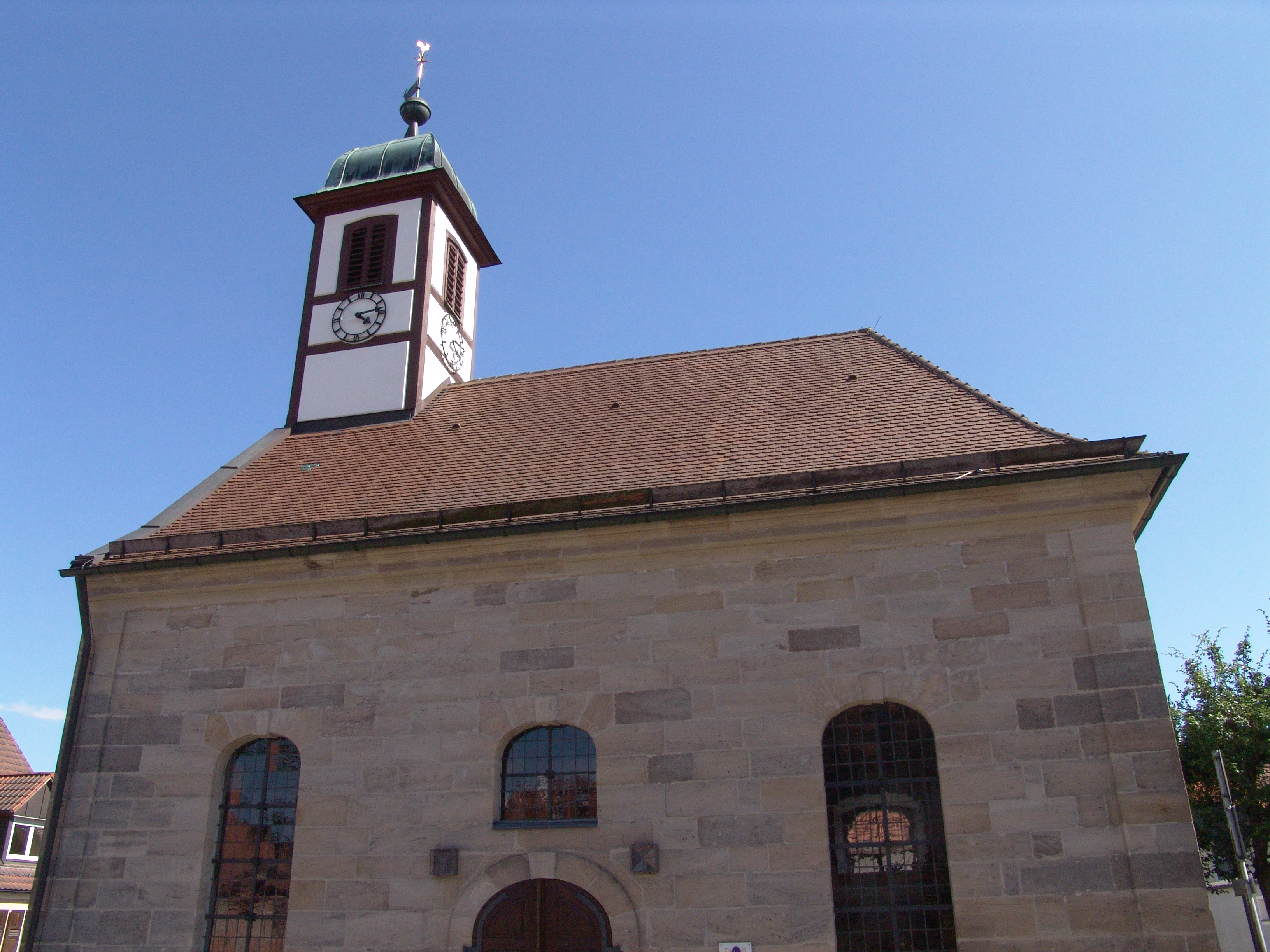 Wilhelmsdorf, Hugenottenkirche